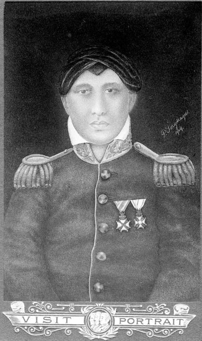 Repronegatief. Mankoe Negoro II, bestuurde tussen 1796 en 1835 het gebied Mangkoe Negaram onafhankelijk van de soesoehoenan.